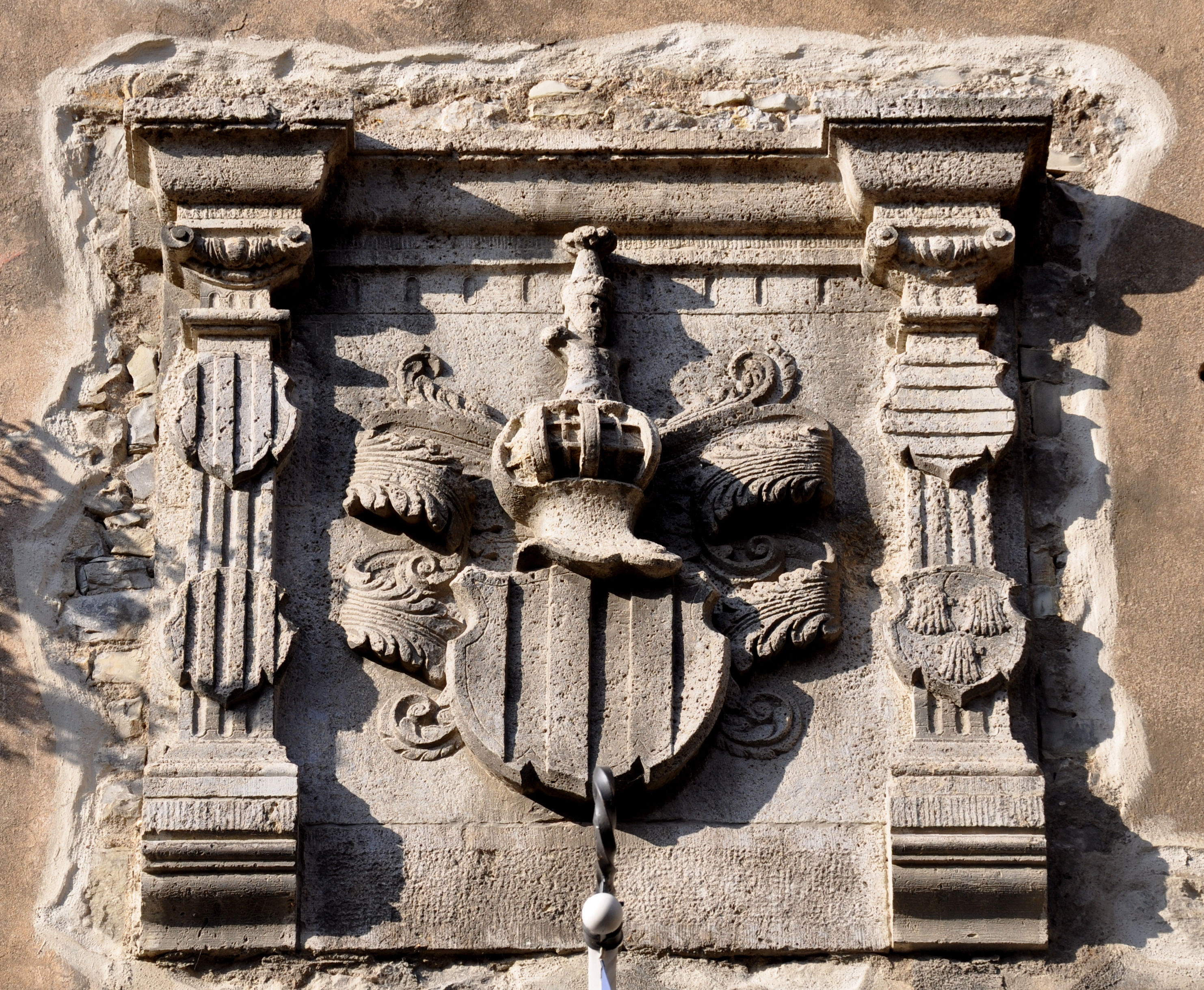 Marktbreit, Rathaus, Wappenrelief der Herren von Seinsheim